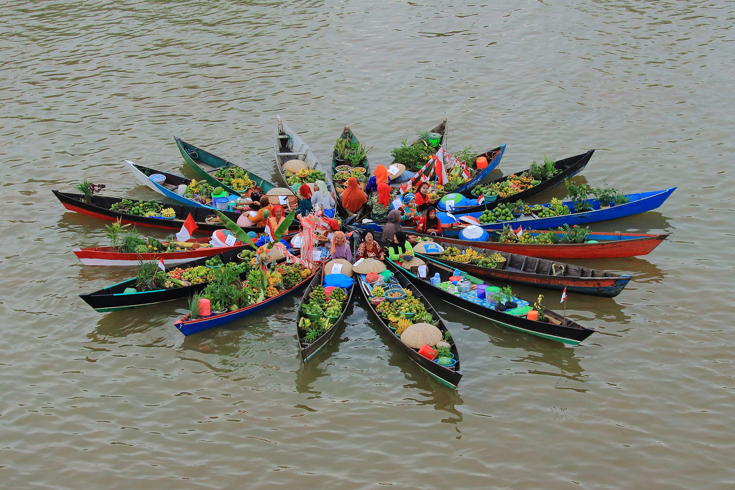 Jukung (sampan) berbentuk bunga Teratai merupakan atraksi jukung ibu ibu yang di hias dan membawa sayur sayuran dan buah buahan untuk memeriahkan Hari Jadi kota Banjarmasin di setiap tahun dilaksanakan festival budaya Pasar Terapung pada bulan Agustus. Atraksi jukung teratai sebagai budaya dan pariwisata Kalimantan Selatan